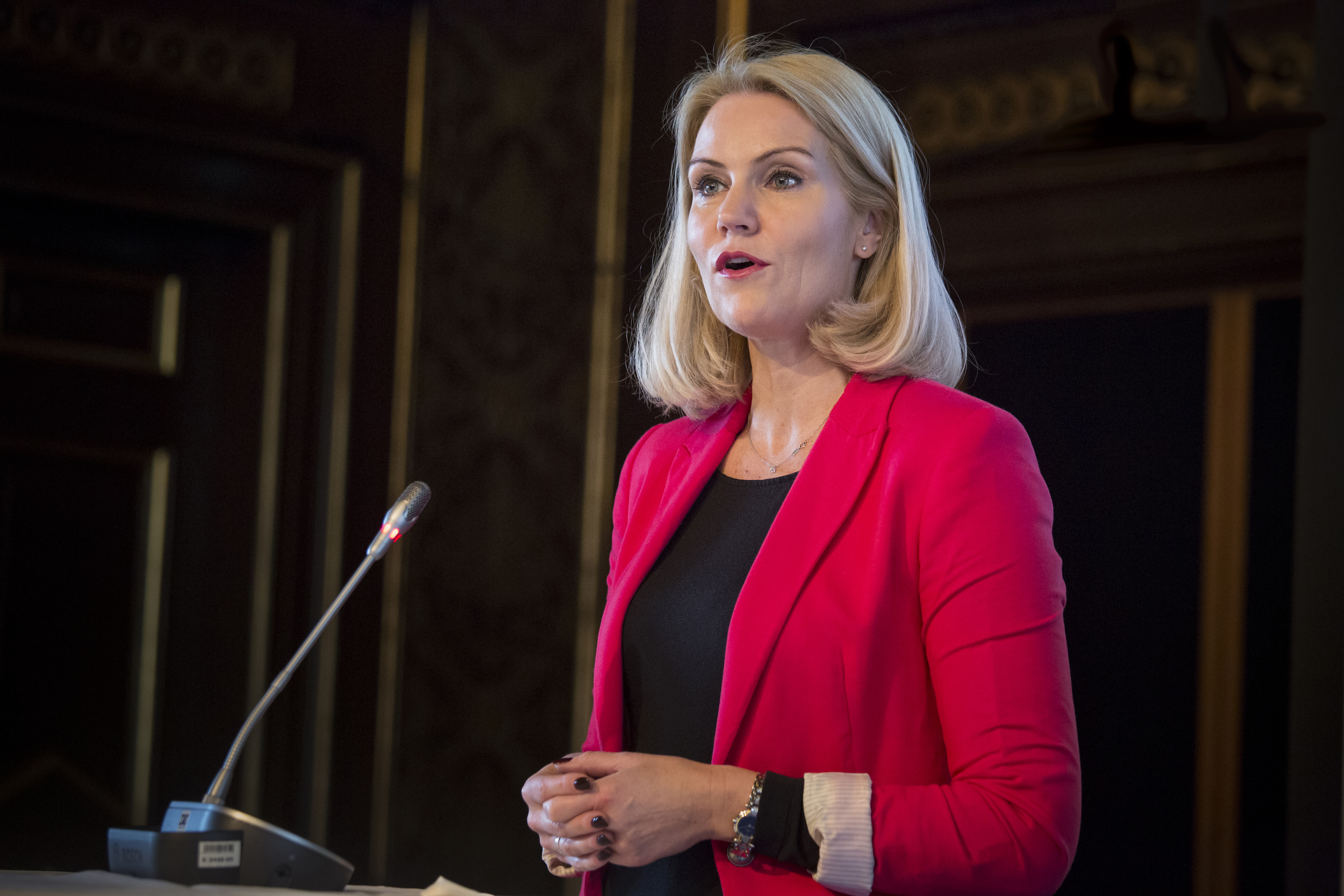 Danmarks statsminister Helle Thorning-Schmidt (S) talar vid ett gränshindermöte arrangerat av Nordiska Ministerrådet i Børsen i København den 30 april 2015. Photo: News Øresund - Johan Wessman © News Øresund(CC BY 3.0) Detta verk av News Øresund är licensierat under en Creative Commons Erkännande 3.0 Unported-licens (CC BY 3.0). Bilden får fritt publiceras under förutsättning att källa anges. The picture can be used freely under the prerequisite that the source is given. News Øresund, Malmö, Sweden. Øresund är en oberoende regional nyhetsbyrå som är en del av det dansk-svenska kunskapscentrat Øresundsinstituttet.